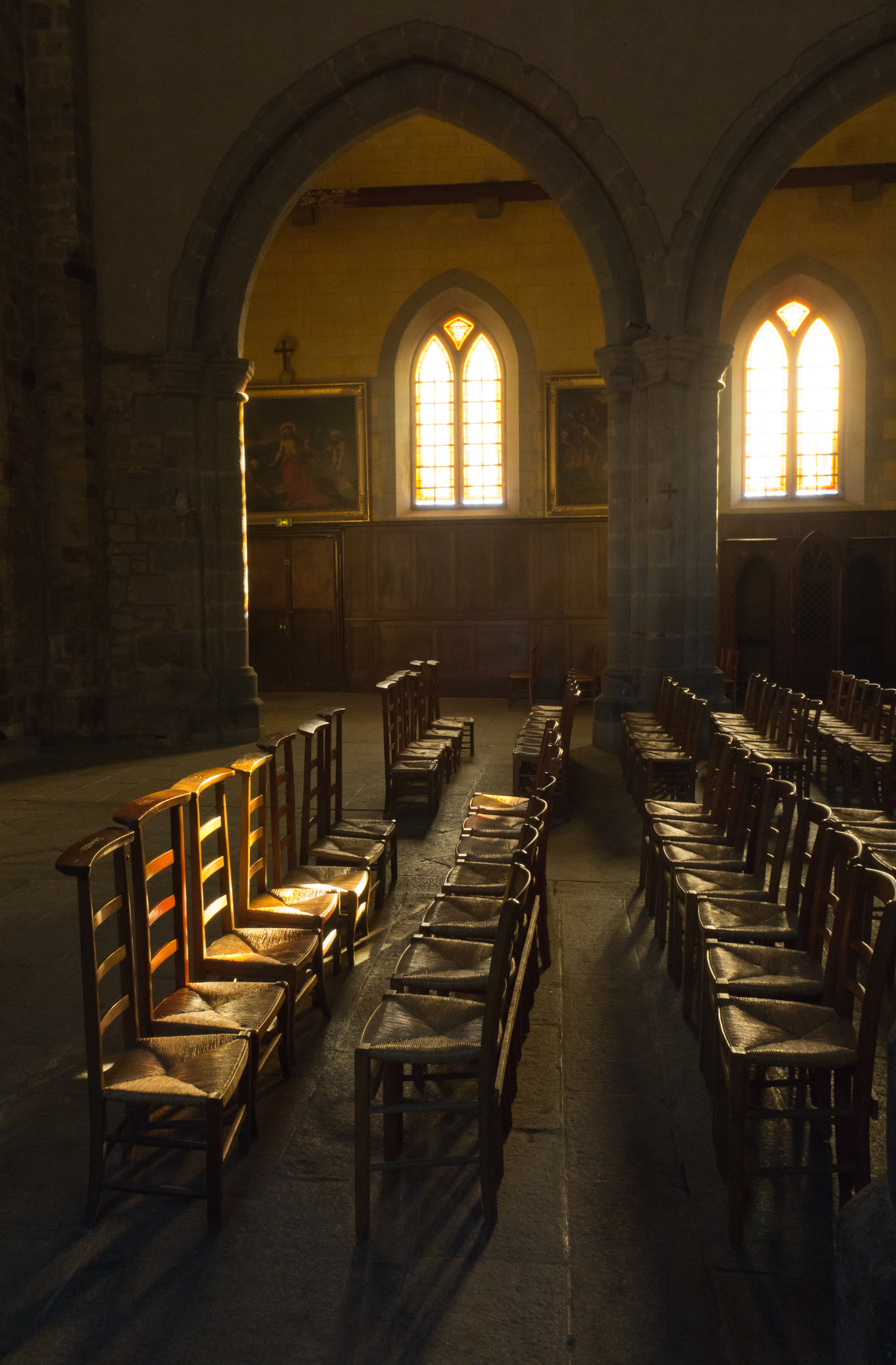 Prie-Dieu dans la nef de l'église Notre-Dame-en-Saint-Melaine.